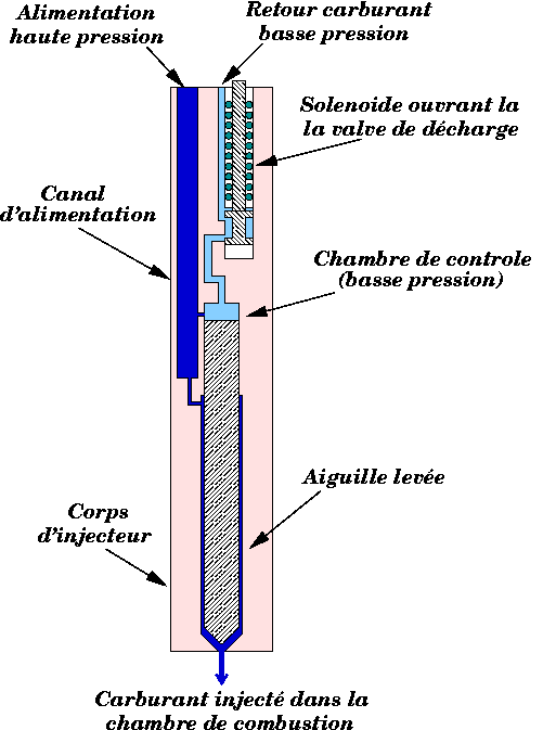 Schéma d'un injecteur diesel pour injection directe (en position ouverte)